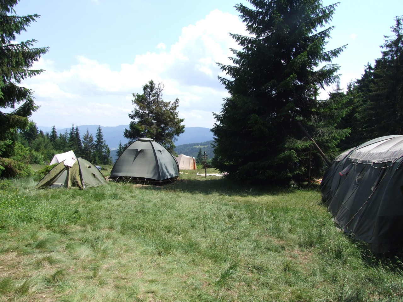 Studenska baza namiotowa na Halach Gorcowskich